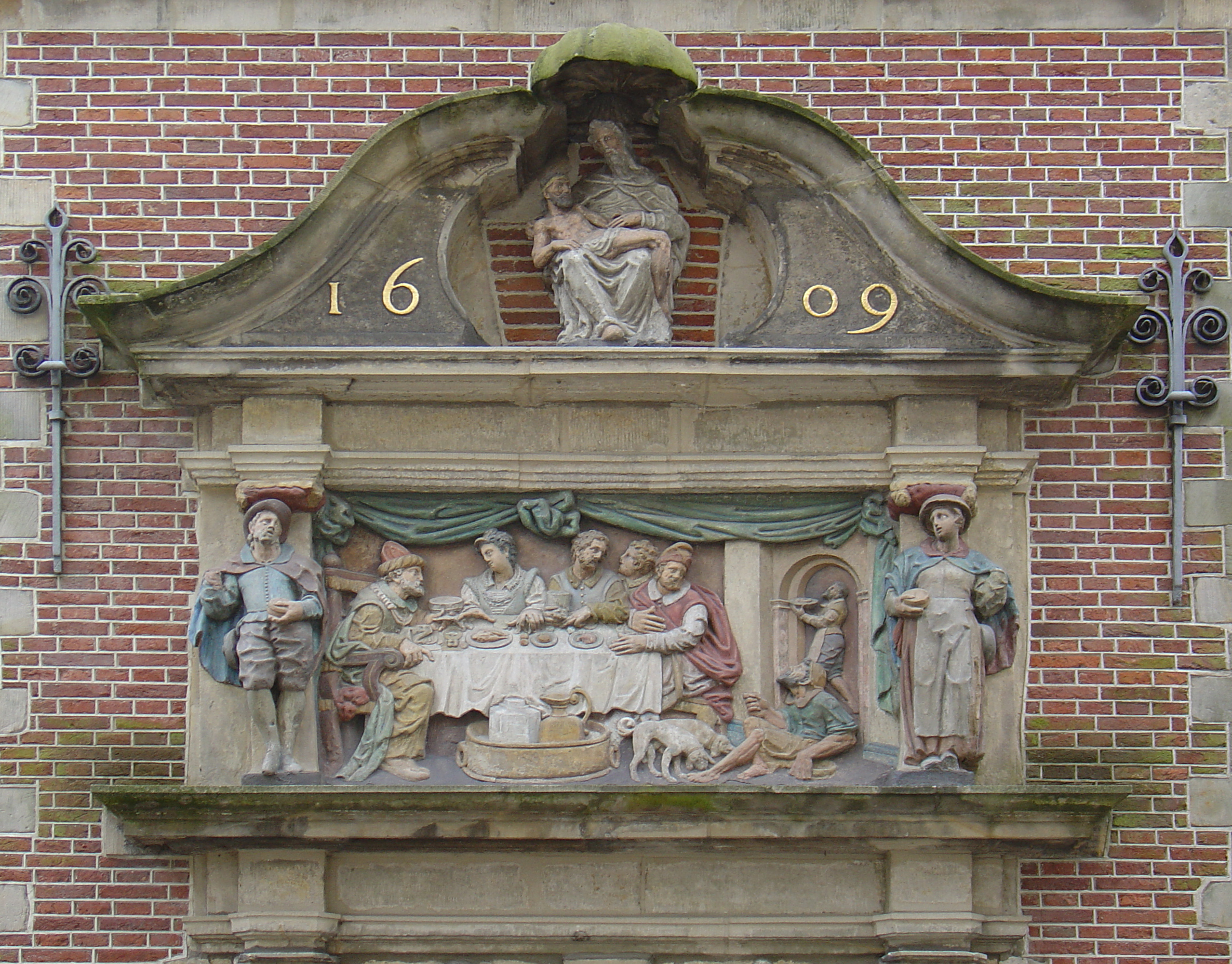 Foto van een detail van het Lazaruspoortje (gemaakt door Gregorius Cool in 1609) te Gouda. De foto is gemaakt op 12 februari 2006 door Jan Lafeber. Categorie:Afbeelding Gouda